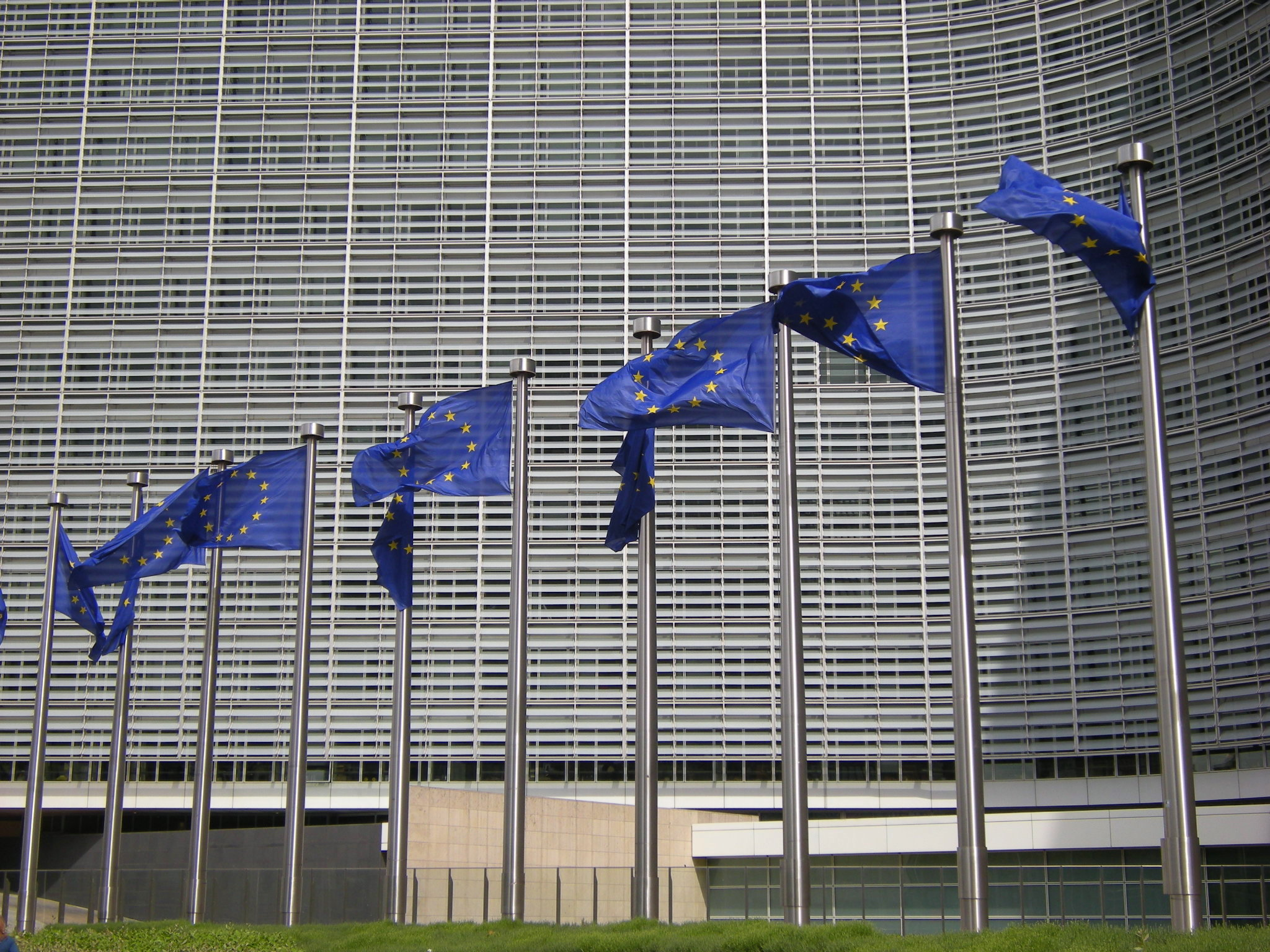 Sede da Comissão Européia